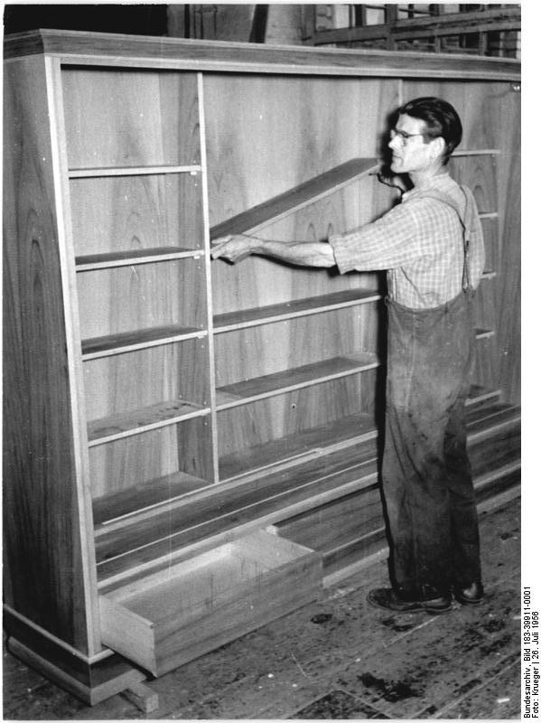 Berlin, Möbelfabrik, Endmontage Zentralbild Krueger 26.7.1956 Krue-Sch. VEB-Raumkunst bereitet sich auf die Herbstmesse 1956 vor. Auf der Leipziger Herbstmesse 1956 wird der VEB Raumkunst, Berlin, den Jordan-Bücherschrank in zwei Ausführungen, jedoch diesmal nicht als Einzelanfertigung, sondern als Stücke aus der Serienproduktion zeigen. UBz: Der Tischler Karl Sandmeier passt die Einlegeböden bei einem Messemodell ein.